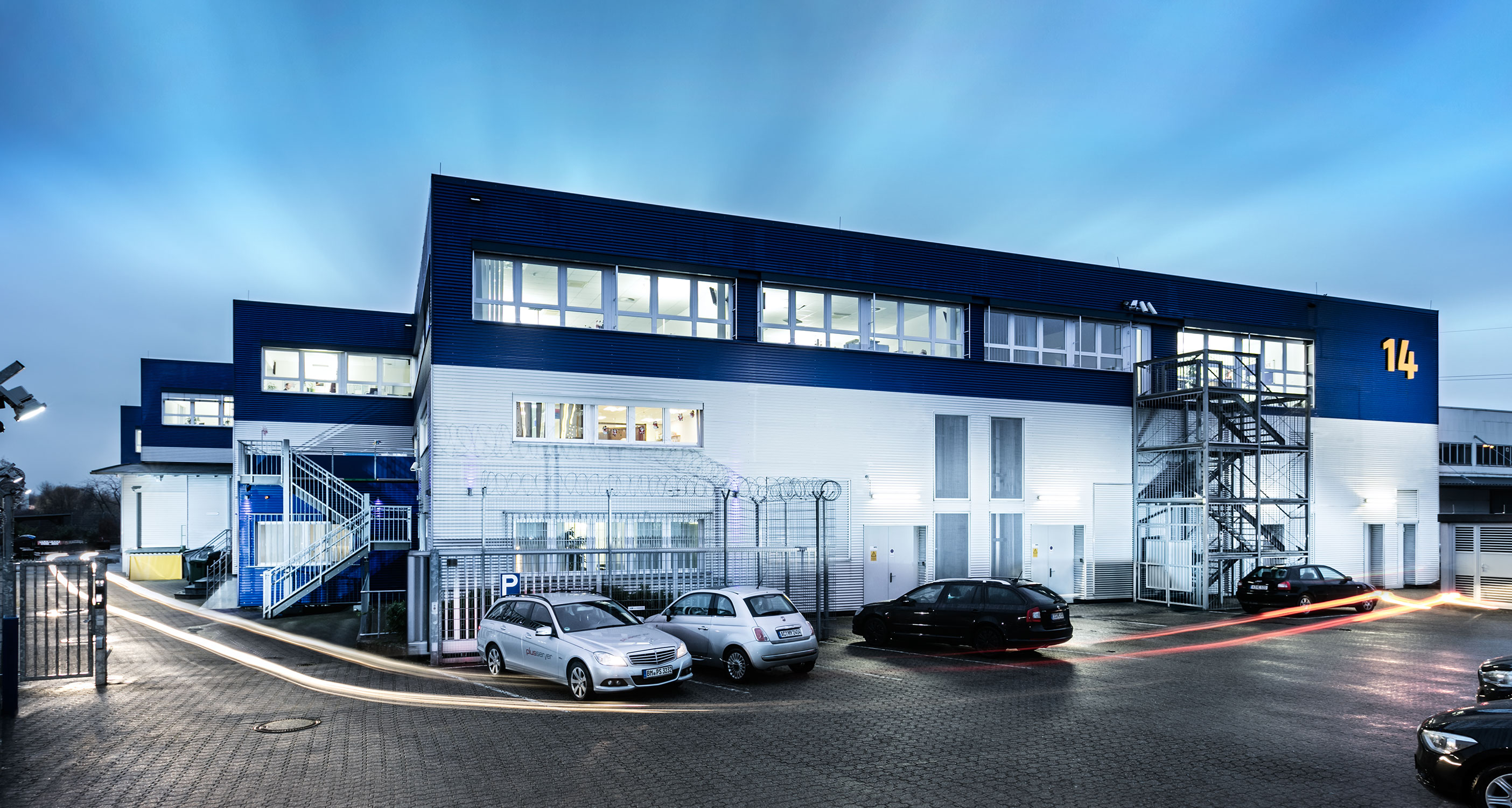 Das eigene Rechenzentrum DataCore der PlusServer GmbH in Köln ist nach ISO 27001 und PCI DSS zertifiziert.